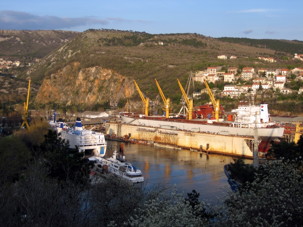 brodogradilište Viktor Lenac